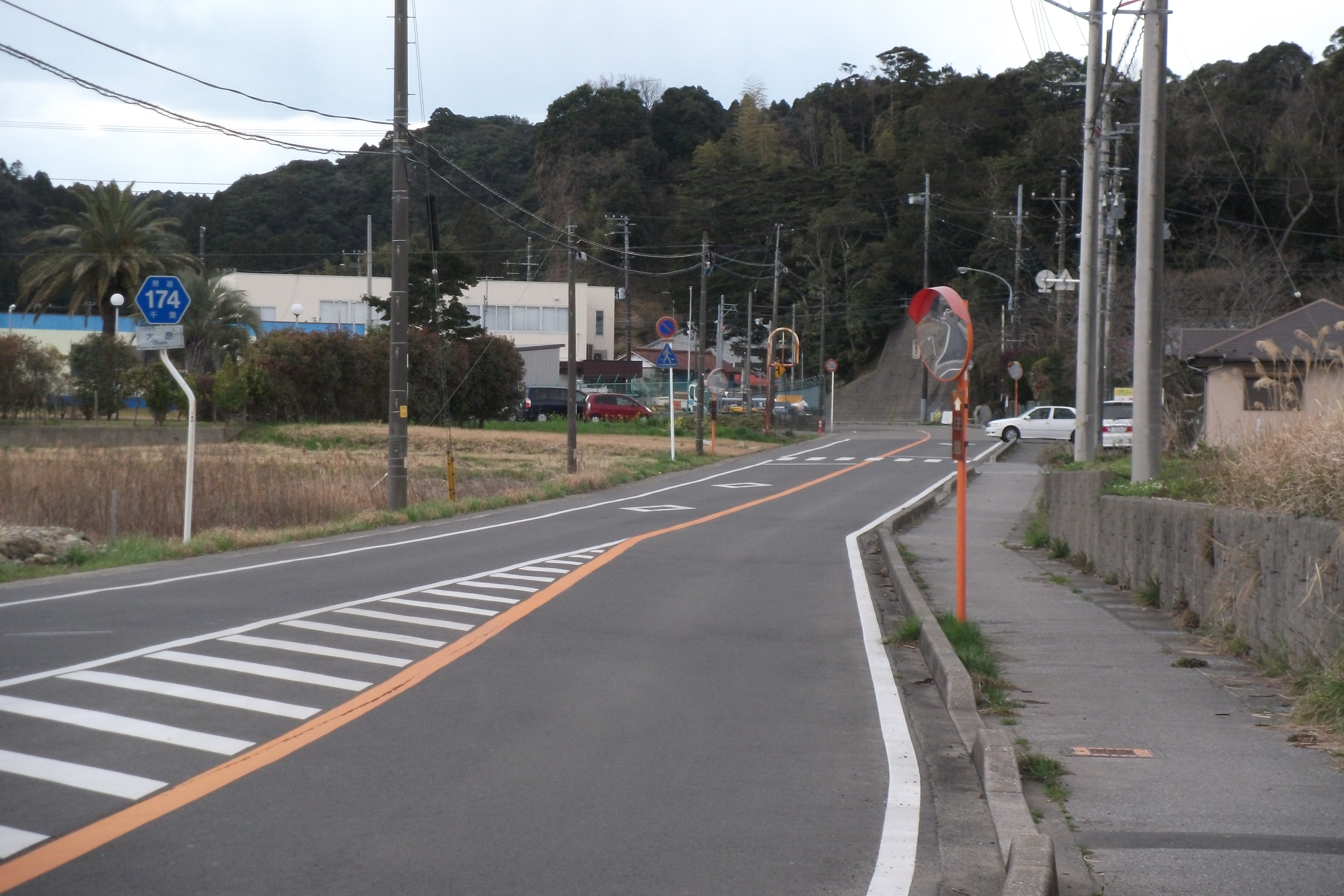 千葉県道174号勝浦布施大原線 (いすみ市大原)